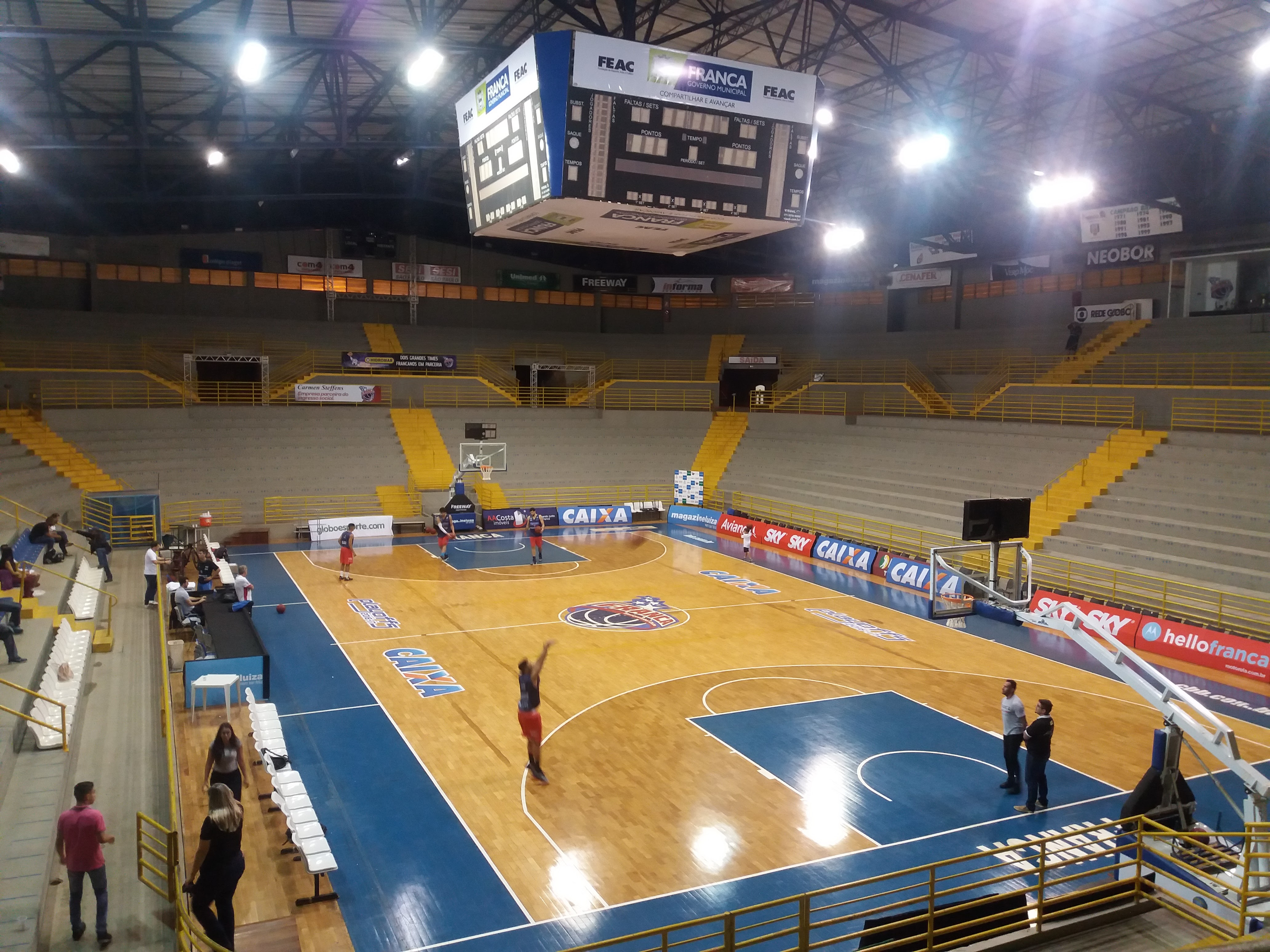 Ginásio Pedrocão, Franca (SP), Brazil. Fotografia feita durante um treino do Franca Basquete